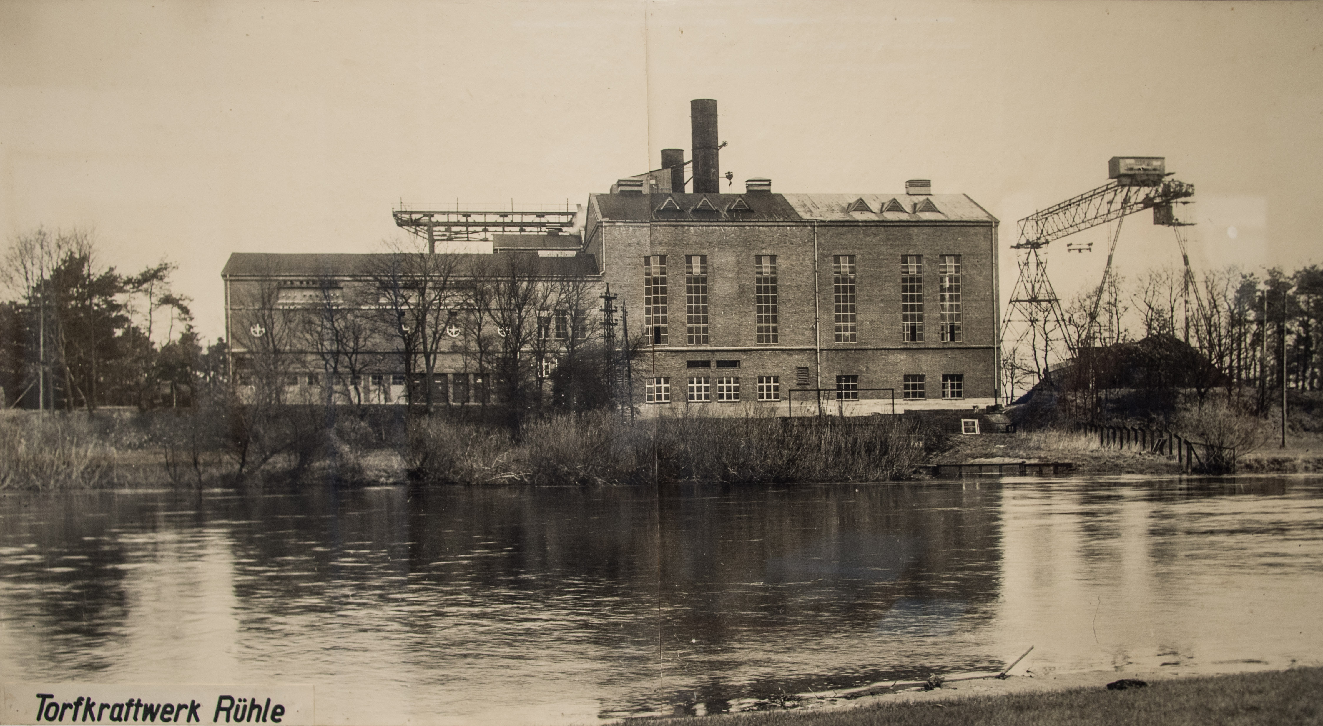 Emsland Moormuseum, Foto Torfkraftwerk Rühle, ca. 1930, Author unbekannt